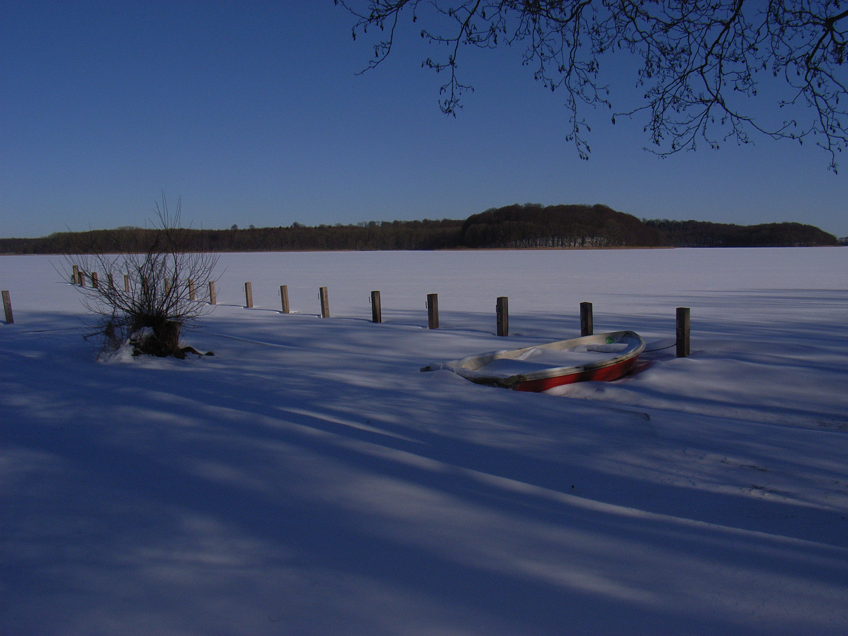 Naturschutzgebiet „Ahrensee und nordöstlicher Westensee“ in Schleswig-Holstein im Winter, Wulfsfelder Bucht mit Blick auf Marutendorf (NSG-Nr. SH 140)